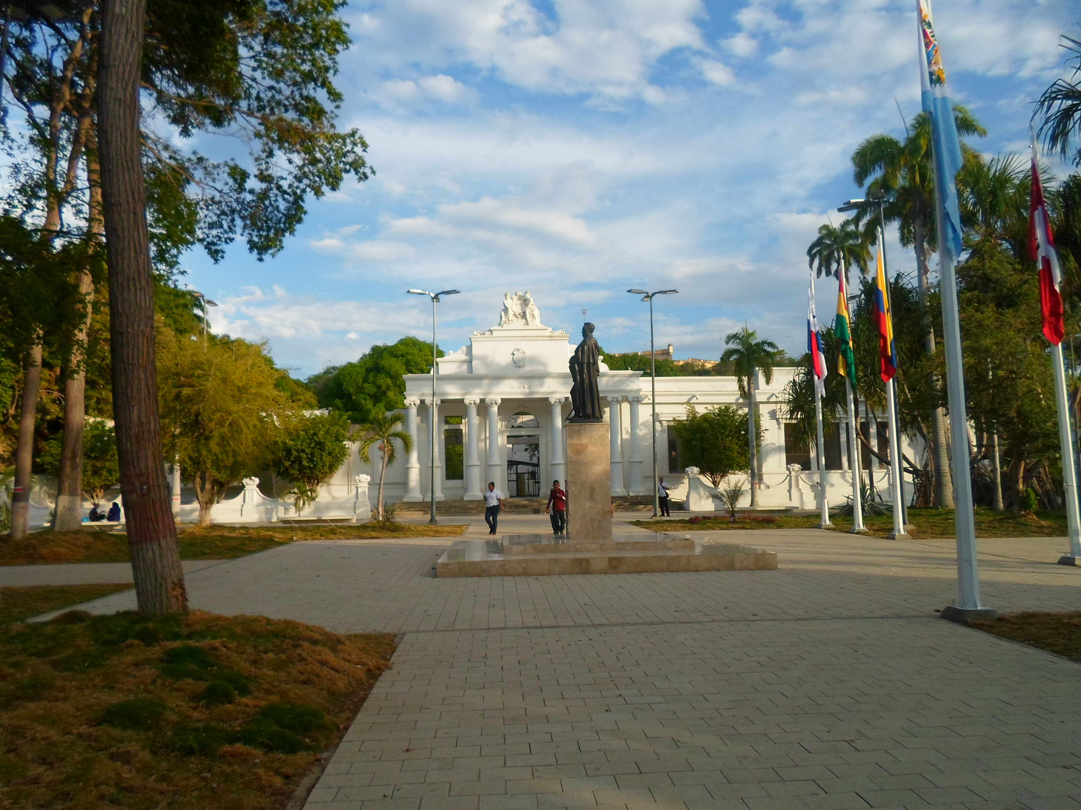 Lateral de la Plaza Bolívar, al fondo el Palacio de Gobierno de Cumaná